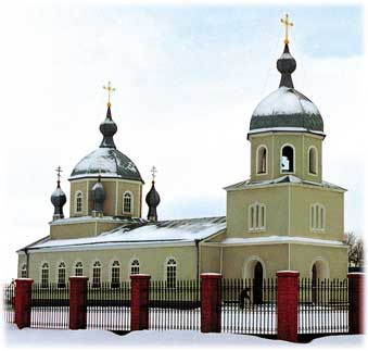 Храм Скородное Губкинский район Белгородской область